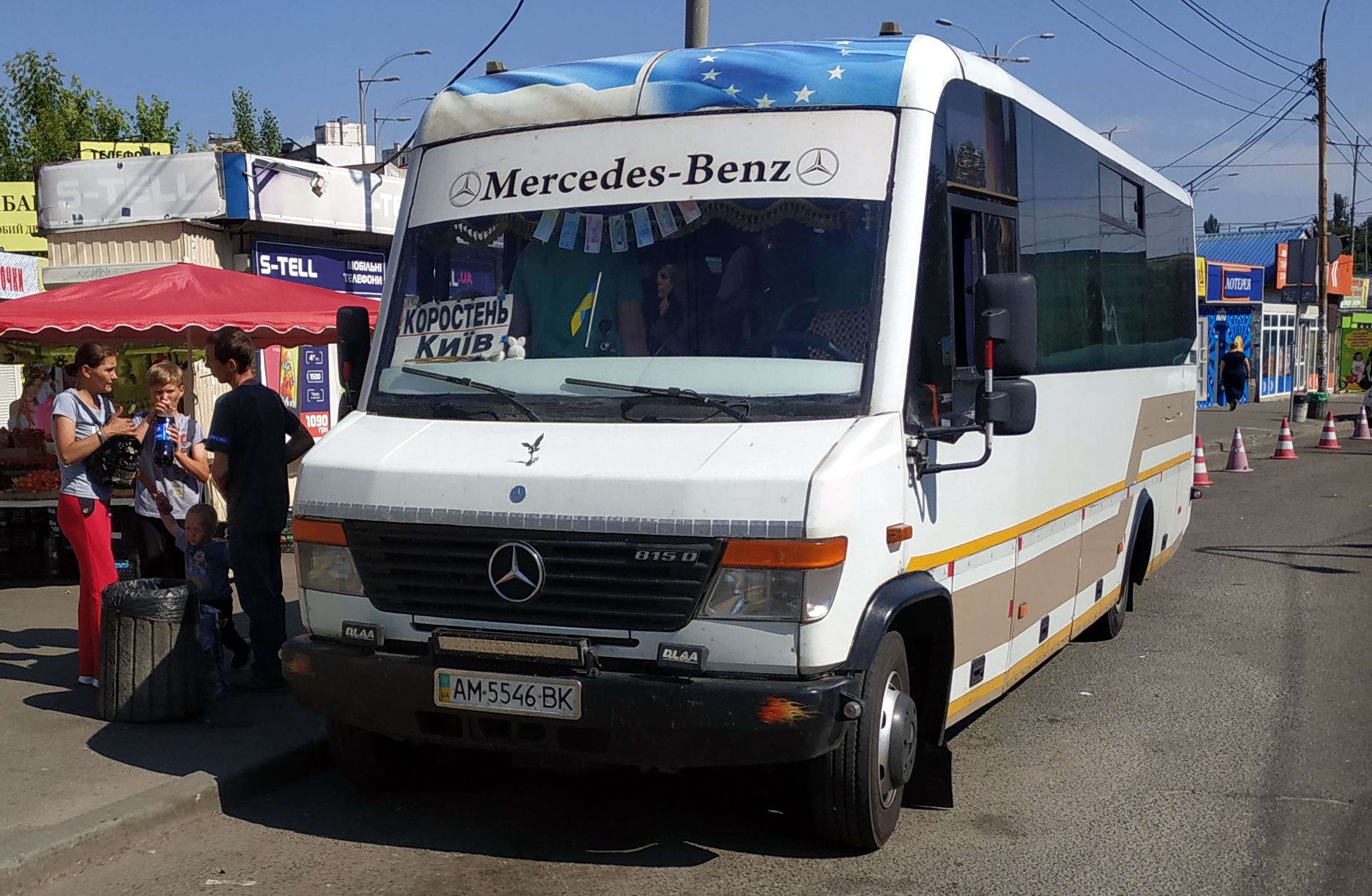 Автобус ГалАЗ А075, Киев, июнь 2019 г.